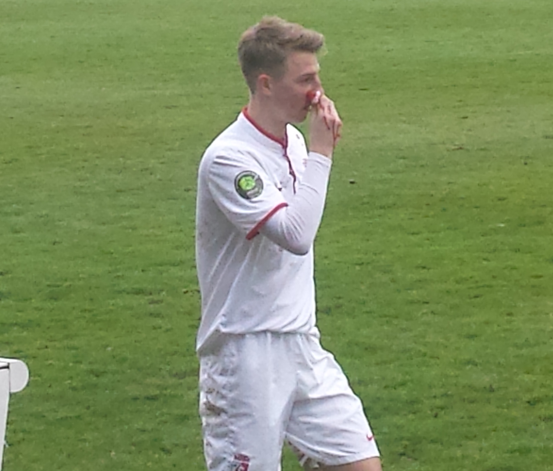 Corentin Halucha, joueur de la réserve du Lille OSC, regagne les vestiaires du fait de son nez cassé. Match RC Lens B / Lille OSC B, comptant pour la vingt-quatrième journée du championnat de CFA (quatrième division française), le 4 avril 2015 au Stade François-Blin d'Avion.